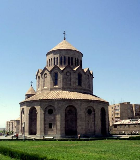 Սուրբ Երրորդություն եկեղեցի Գտնվում է Մալաթիա-Սեբաստիա համայնքում 7/4